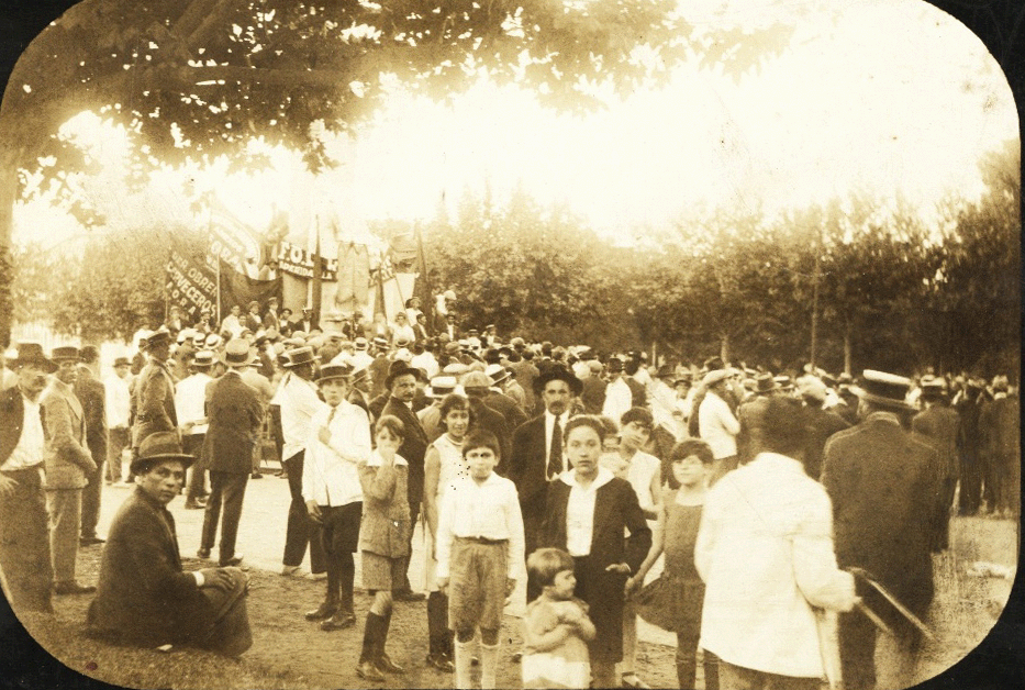 acto de la provincial de santa fe